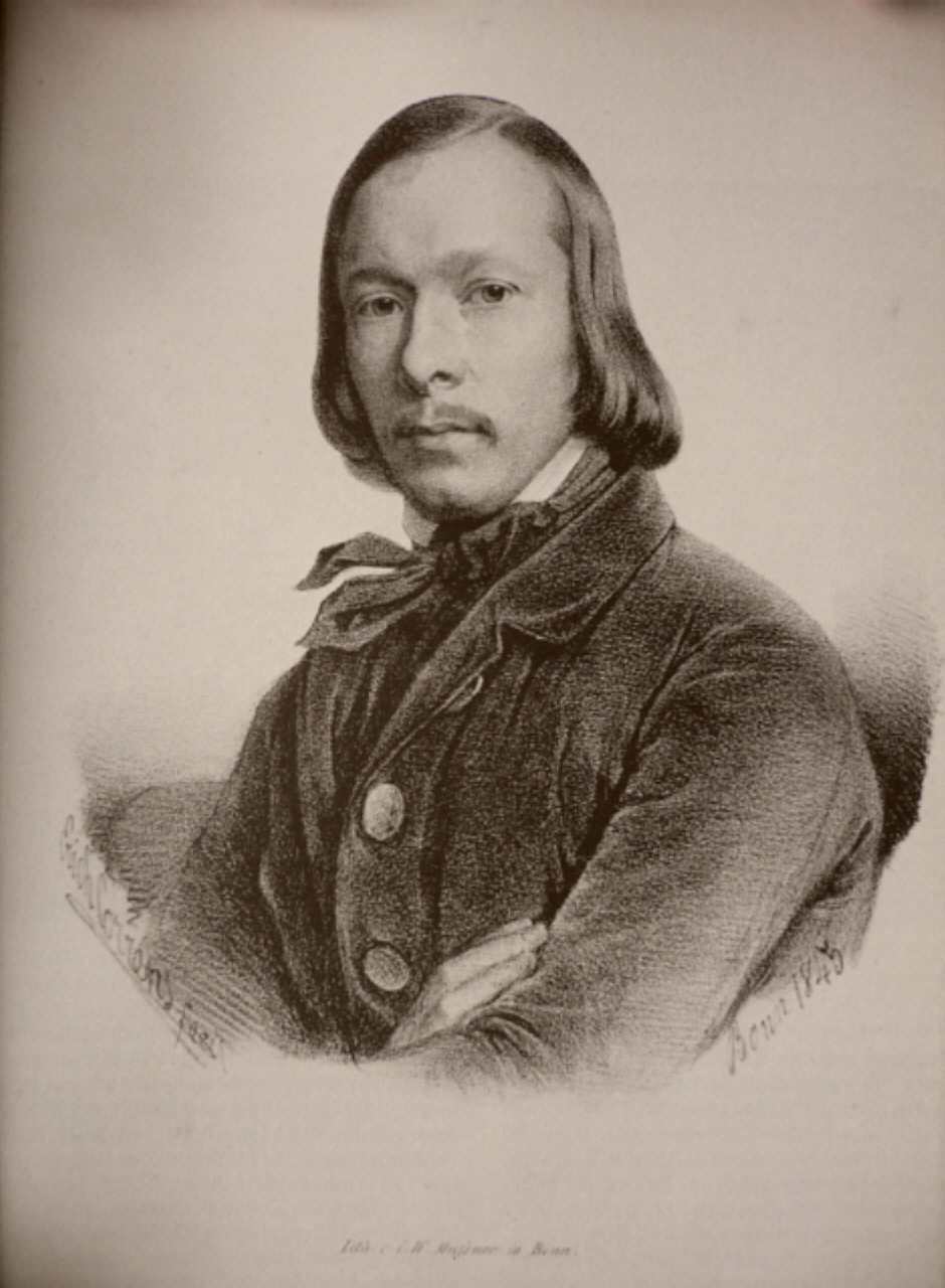 Porträtlithographie von Carl Rudolf Pfahl (1822–1901).